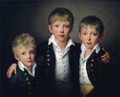 Kinderbild der Brüder Eugen, Gottfried und Theodor Reventlow um 1809